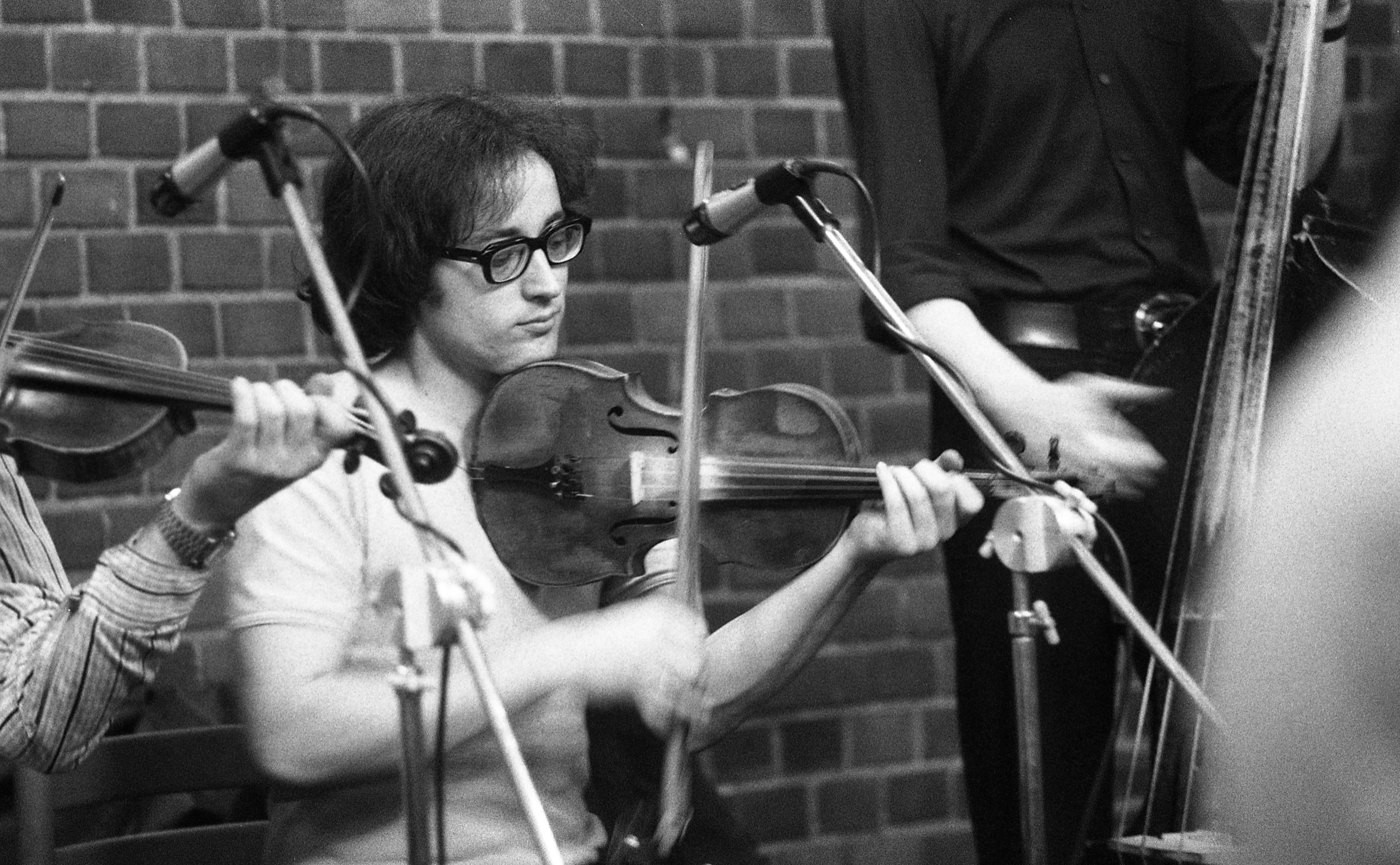 Kassák Klub, a Sebő-együttes táncháza, Sebő Ferenc. Location: Hungary, Budapest XIV. Tags: Budapest Title: Kassák Klub, a Sebő-együttes táncháza, Sebő Ferenc.